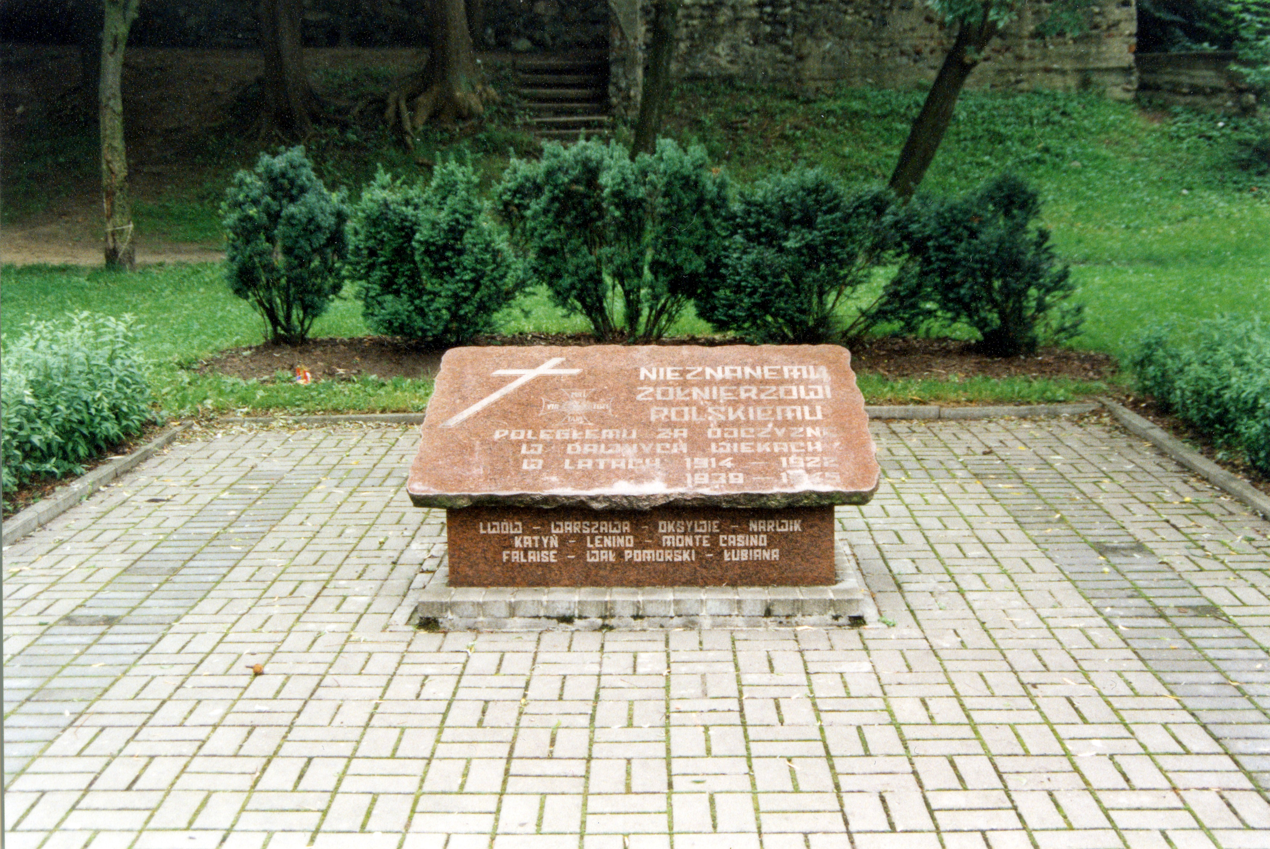 Tablica pamiątkowa, Kościerzyna.